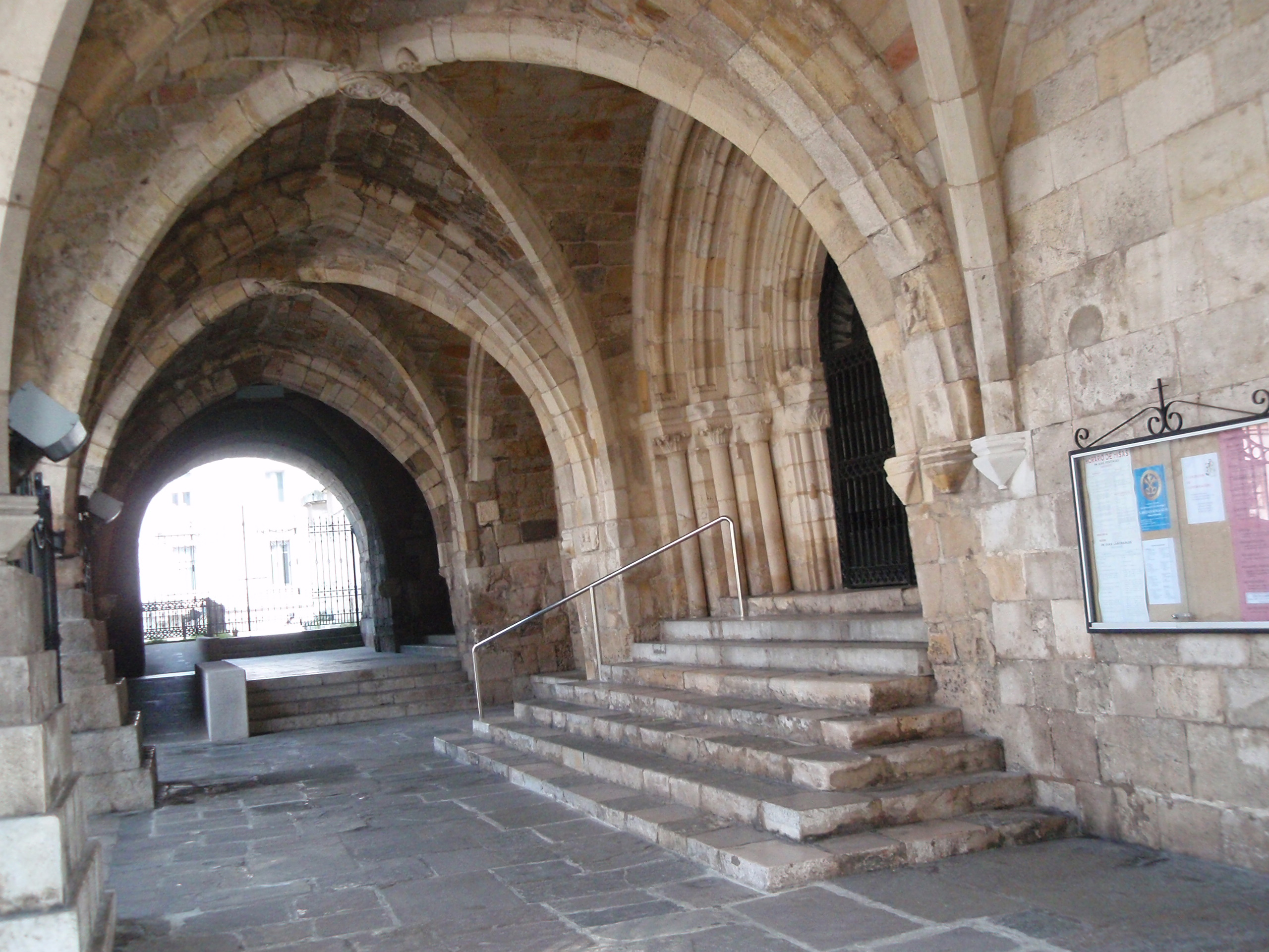 Detalle del acceso a la Cripta, de la Catedral de Santander.